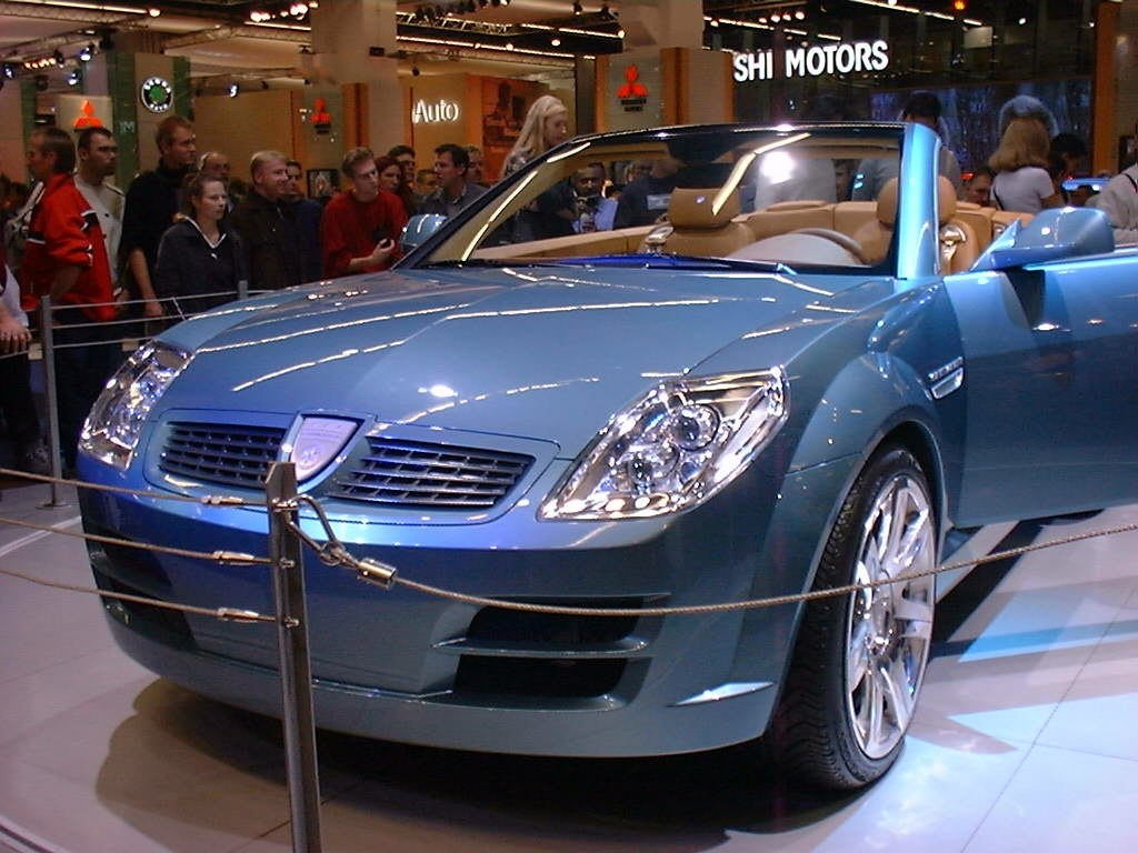 Quelle: selbst fotografiert auf der IAA 2001 Fotograf: Späth Chr.